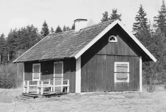 Tuppstugan